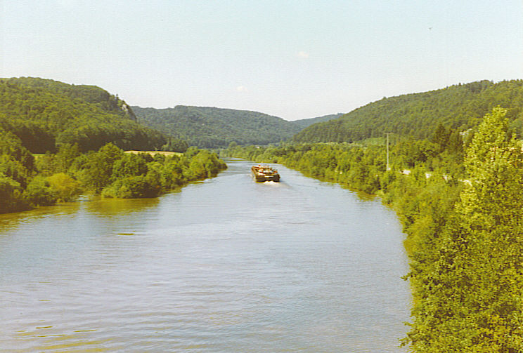 eigen foto